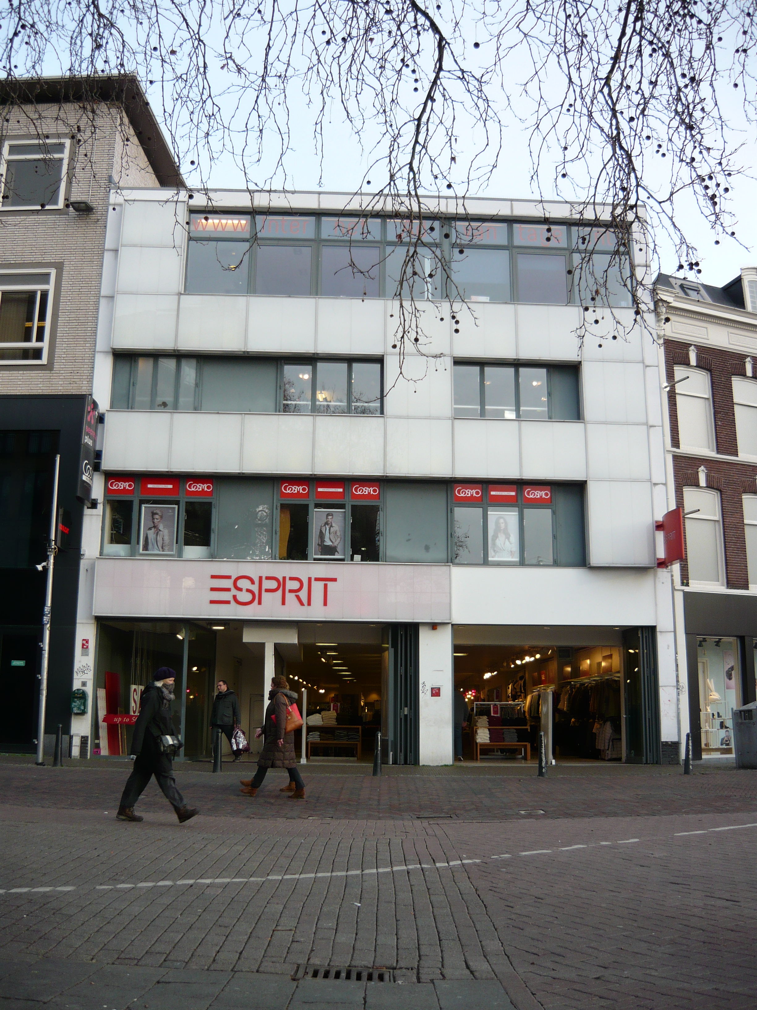 Bioscoop Vreeburg, Vredenburg 8 te Utrecht. Geopend in 1908, vernieuwd in 1936 naar ontwerp Gerrit Rietveld, gesloten 1974.